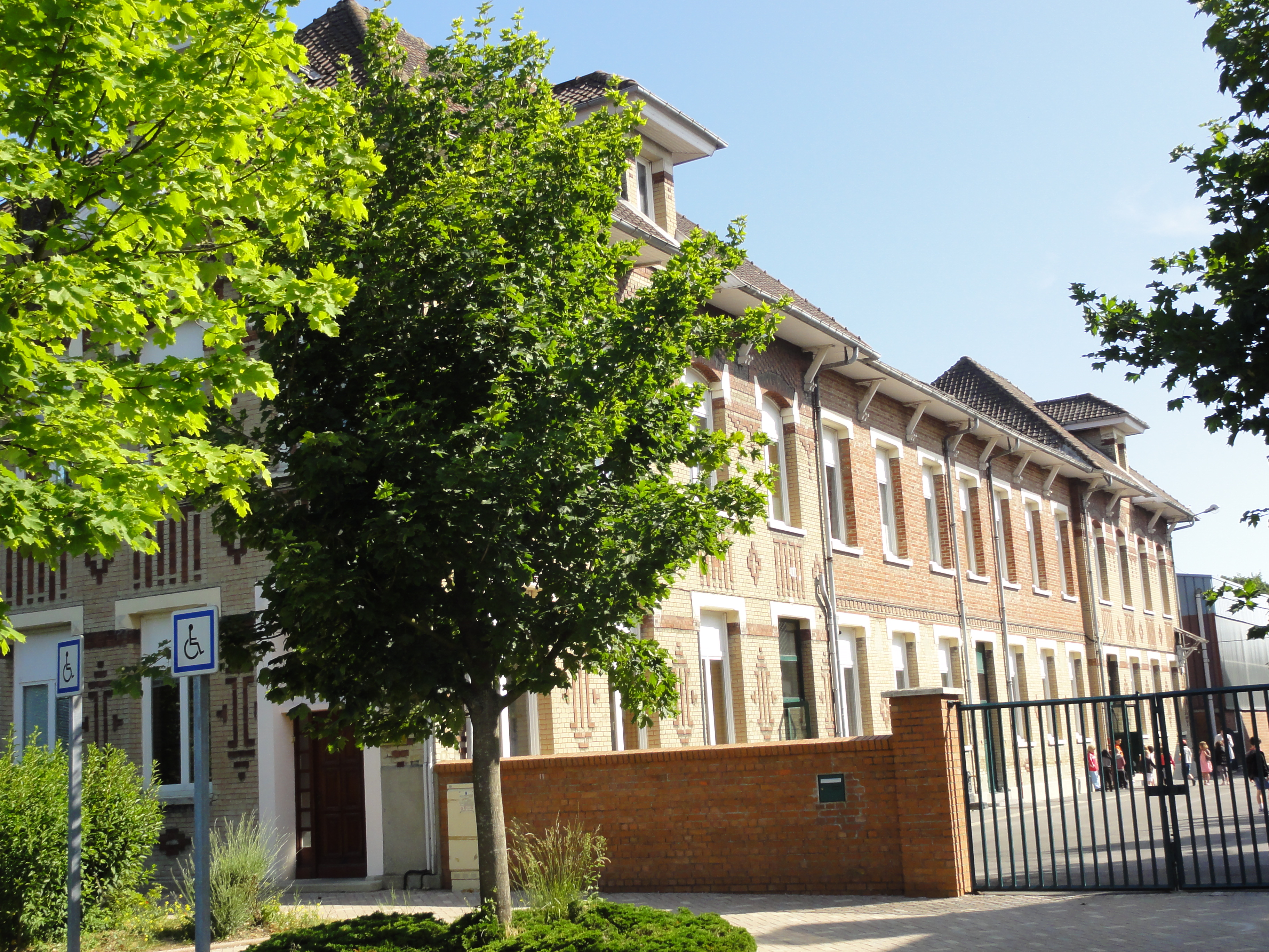 Écoles des cités de la Fosse n° 8 - 8 bis de la Compagnie des mines de Lens, Vendin-le-Vieil, Pas-de-Calais, Nord-Pas-de-Calais, France.